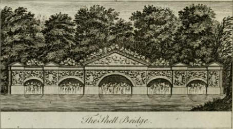 Detail ilustrace z knihy Stowe : a description of the house and gardens of the most noble and puissant prince, George Grenville Nugent Temple, Marquis of Buckingham, Earl Temple, Viscount and Baron Cobham .. (1788)